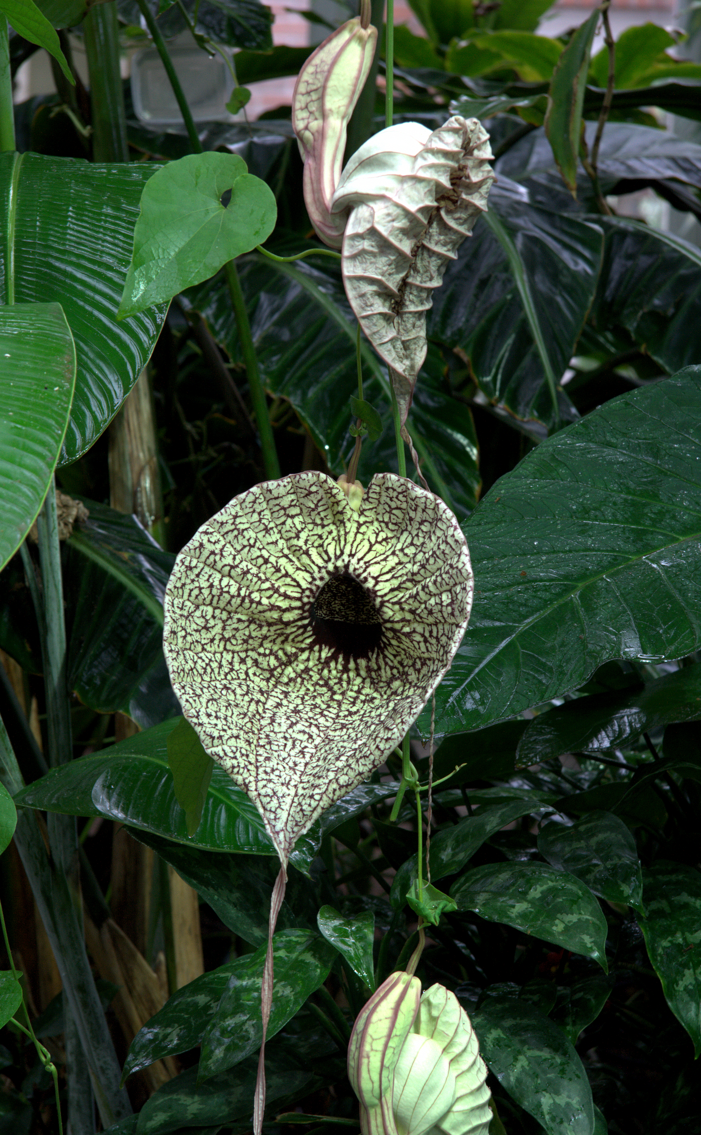 Aristolochia grandiflora